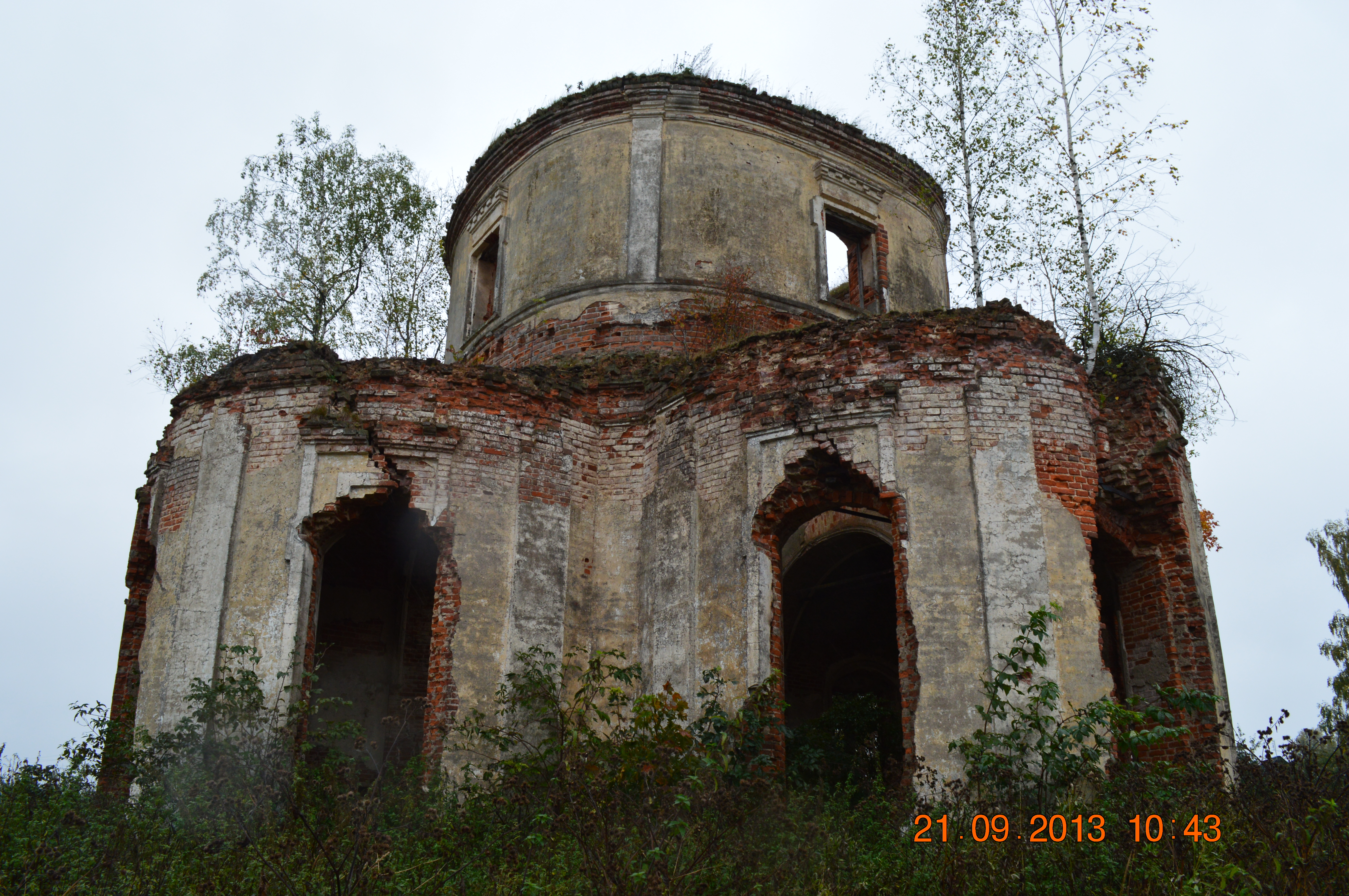 Церковь успения (Смоленская область, Смоленск, село палкино)